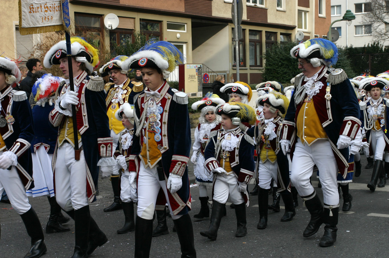 Kadettencorps der Mainzer Ranzen Garde - der Nachwuchs Sonstiges: ...